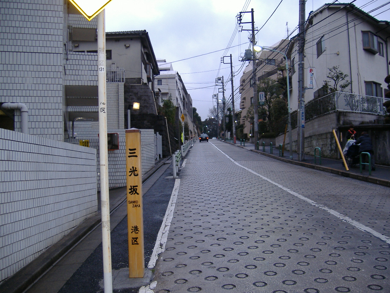 日本の東京都港区白金にある三光坂。